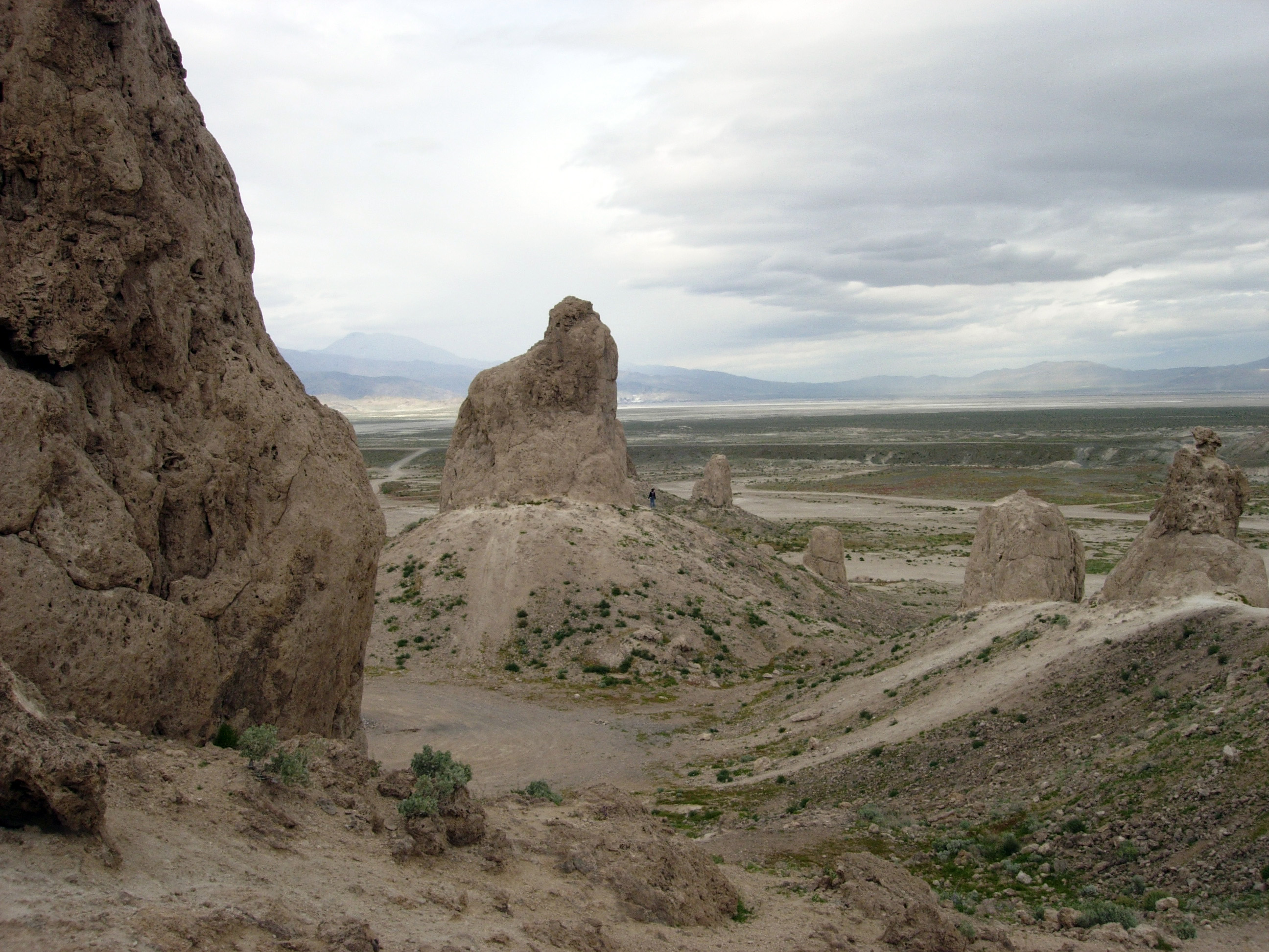 Trona Pinnacles, California.